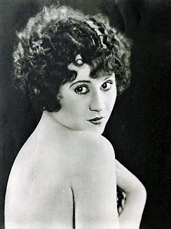 Alberta Vaughn